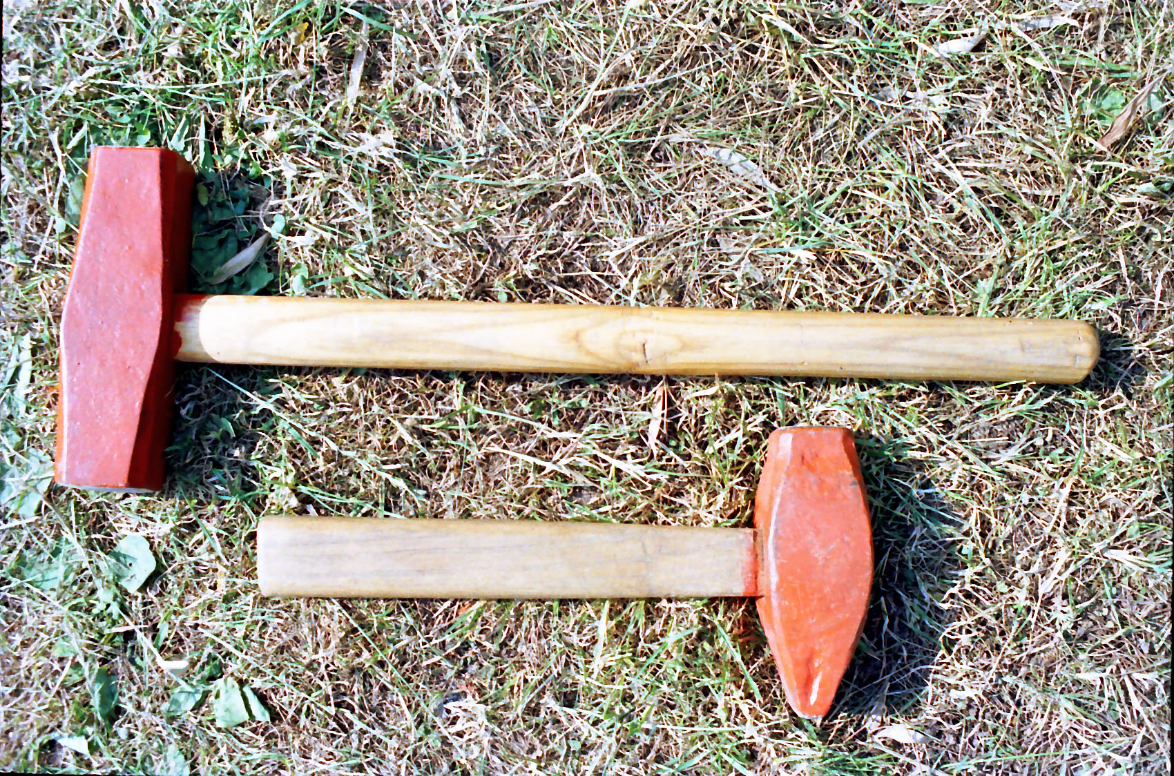 mukkerter.